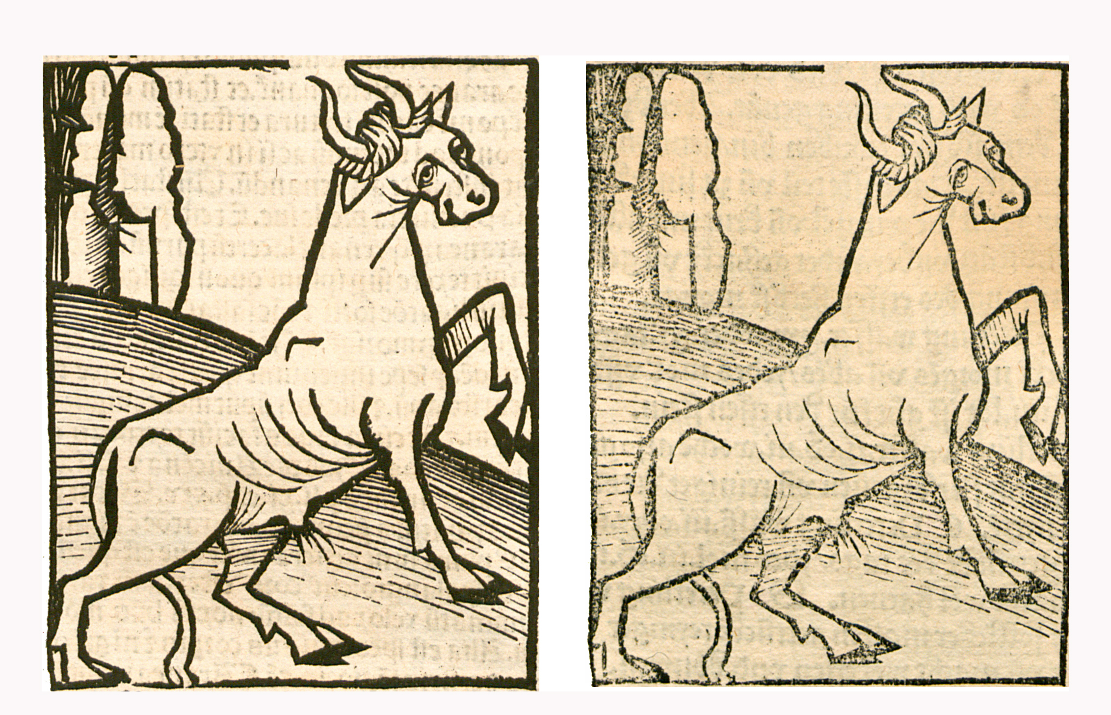 Abbildung von: Ochsen Blut